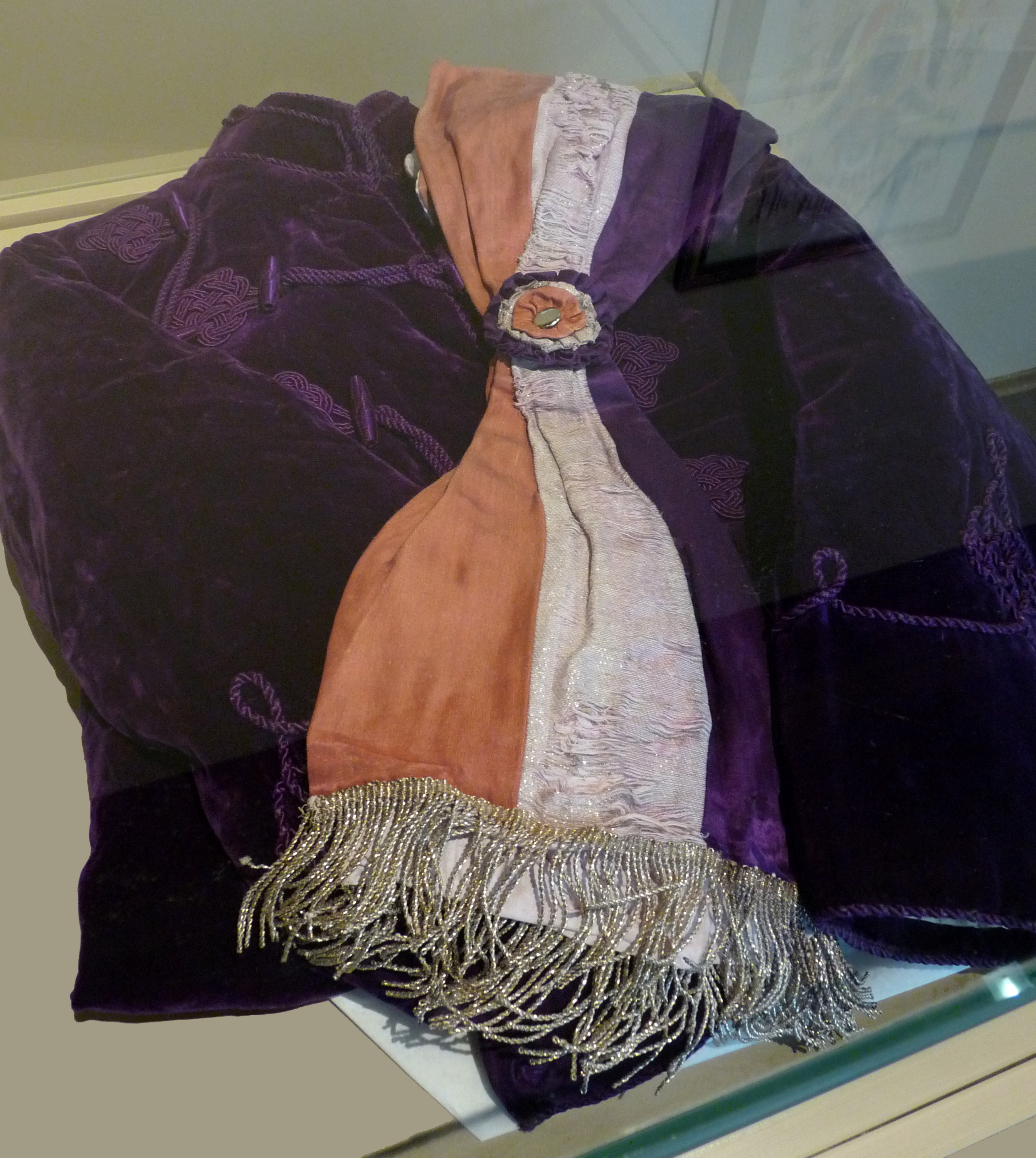 Tenue d'apparat (Flaus) d'étudiant d'une corporation étudiante (Palatia) de l'université allemande, Strasbourg, fin du 19e s. (Musée historique de Strasbourg)